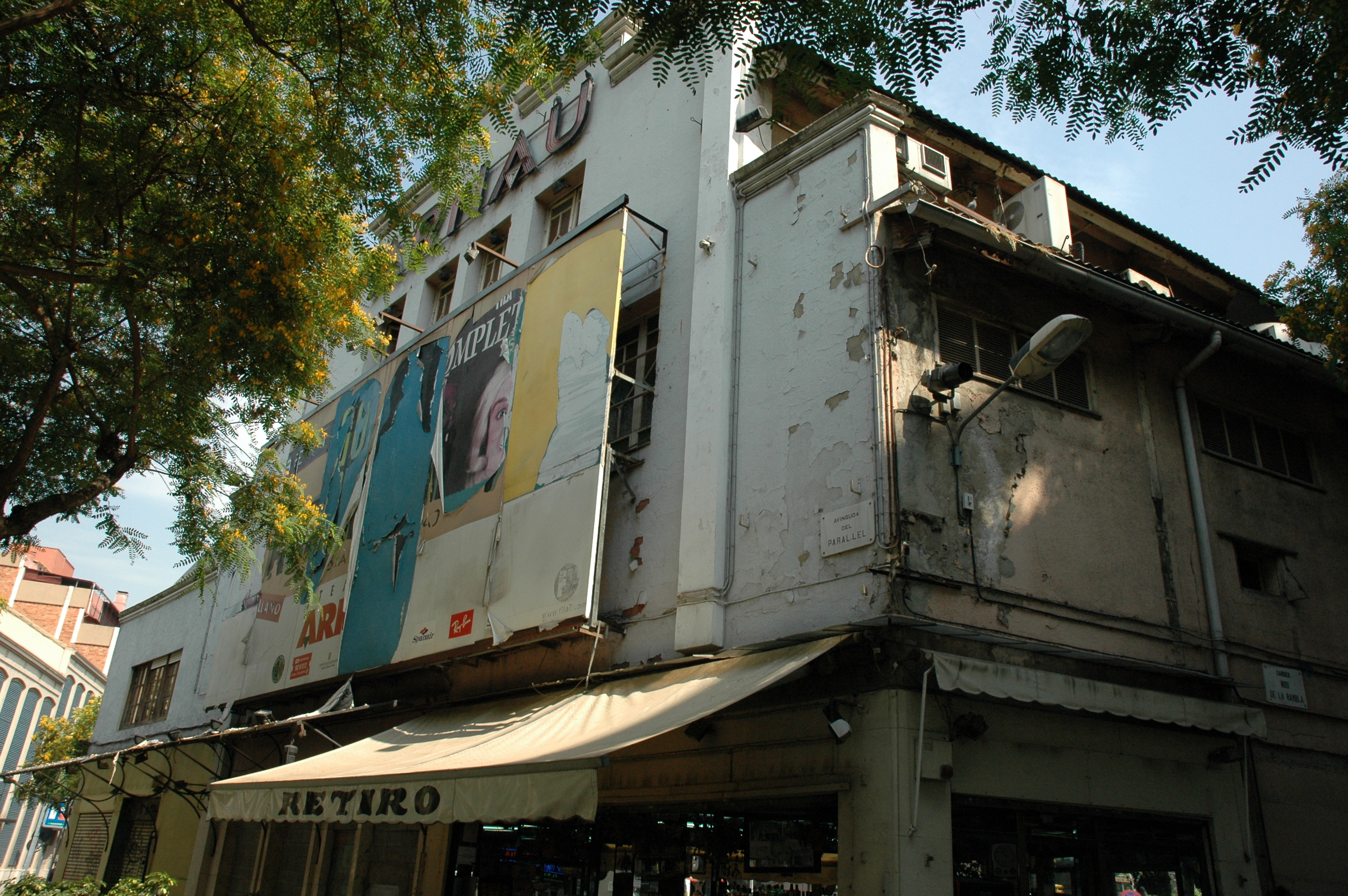 Barcelona - Teatre Arnau